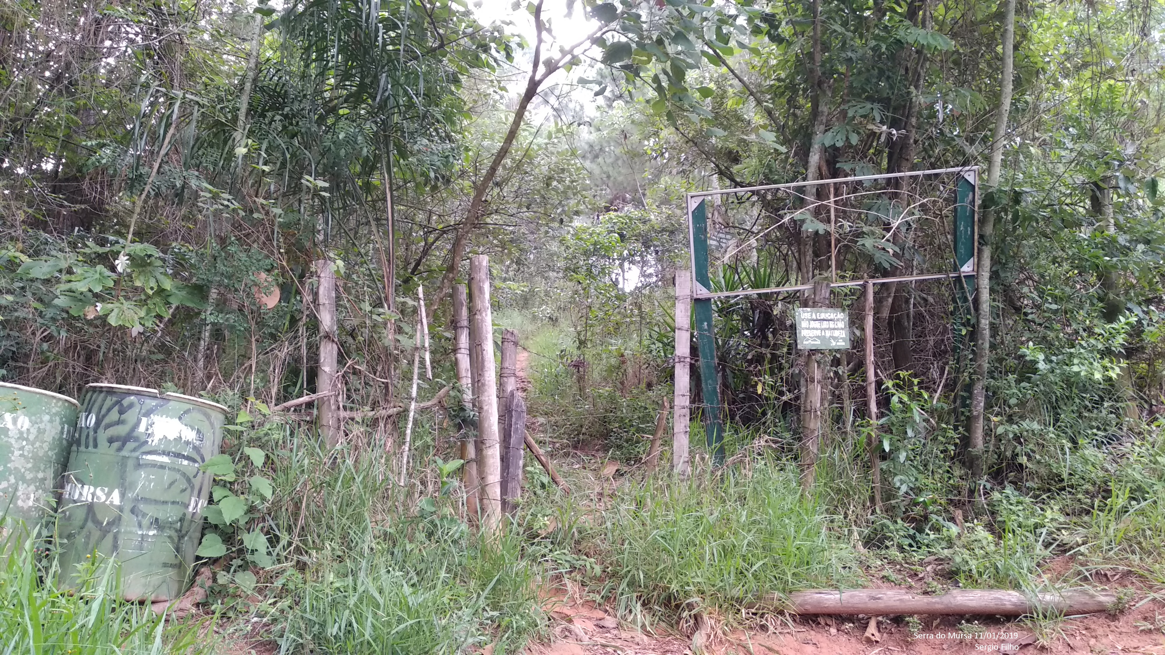 Início da trilha conhecida como tudo ou nada, final da rua Arnold Gut Junior